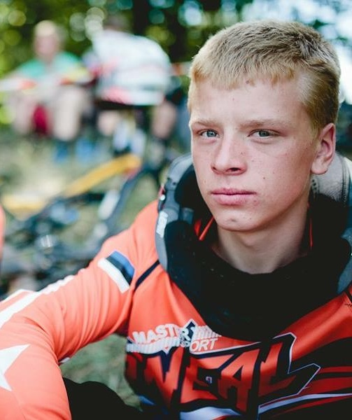 Armin Pilv ootamas oma esimest leedu starti.